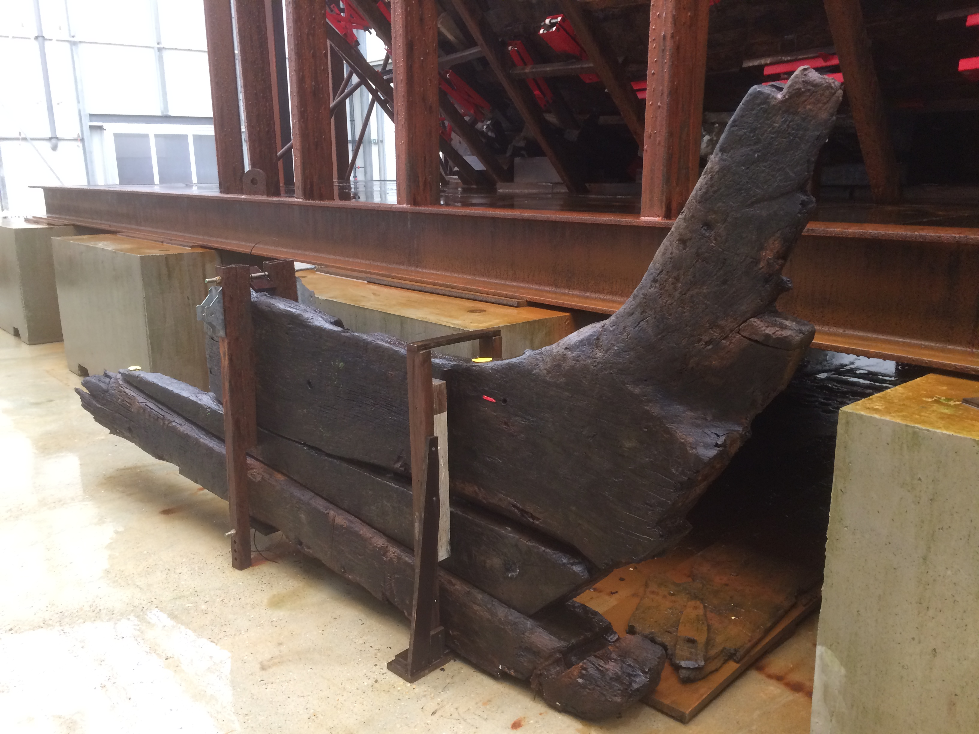 Houten knie, los onderdeel van IJsselkogge